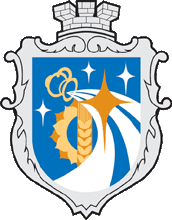 Герб Веселівського району